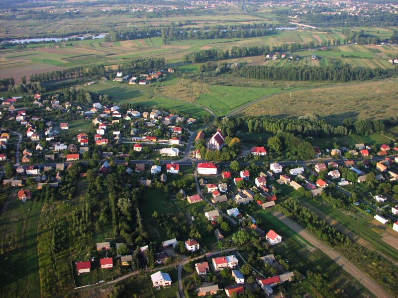 Racławice z lotu ptaka